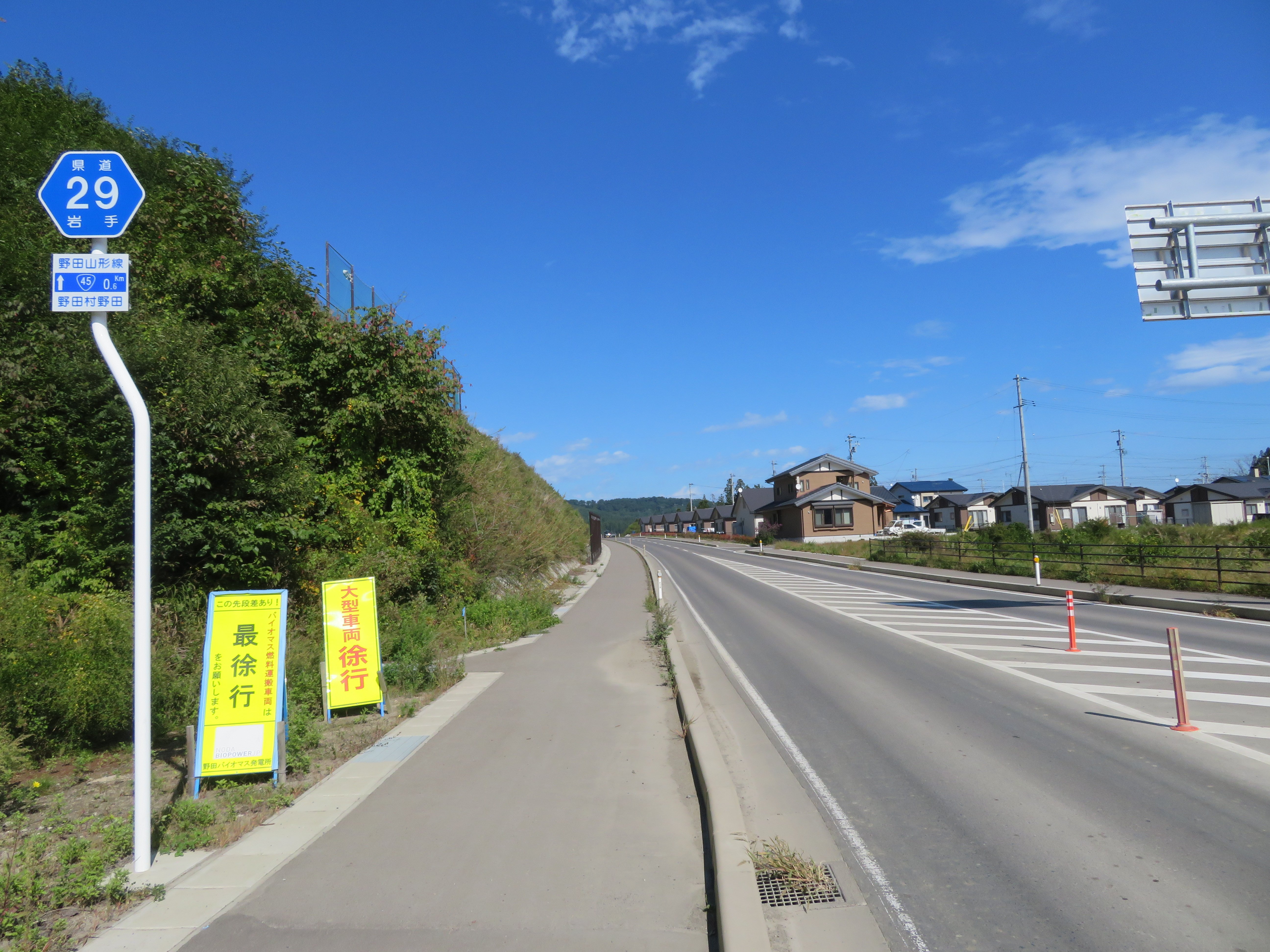 岩手県道29号線 野田村野田付近（国道45号線方面を撮影）